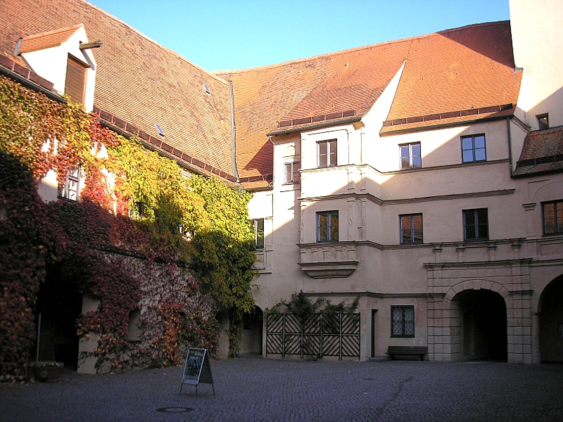 Schloss Friedberg (Landkreis Aichach, Friedberg, Bayerisch-Schwaben). Innenhof, Nord- und Ostflügel. Eigene Aufnahme, Nov. 2007 / Friedberg castle near Augsburg (Bavaria, Germany). Courtyard, looking north east. Own photo, Nov. 2007